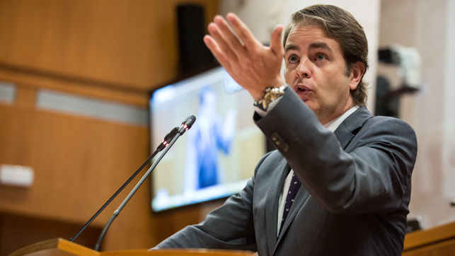 El portavoz del Grupo Parlamentario Popular, Roberto Bermúdez de Castro